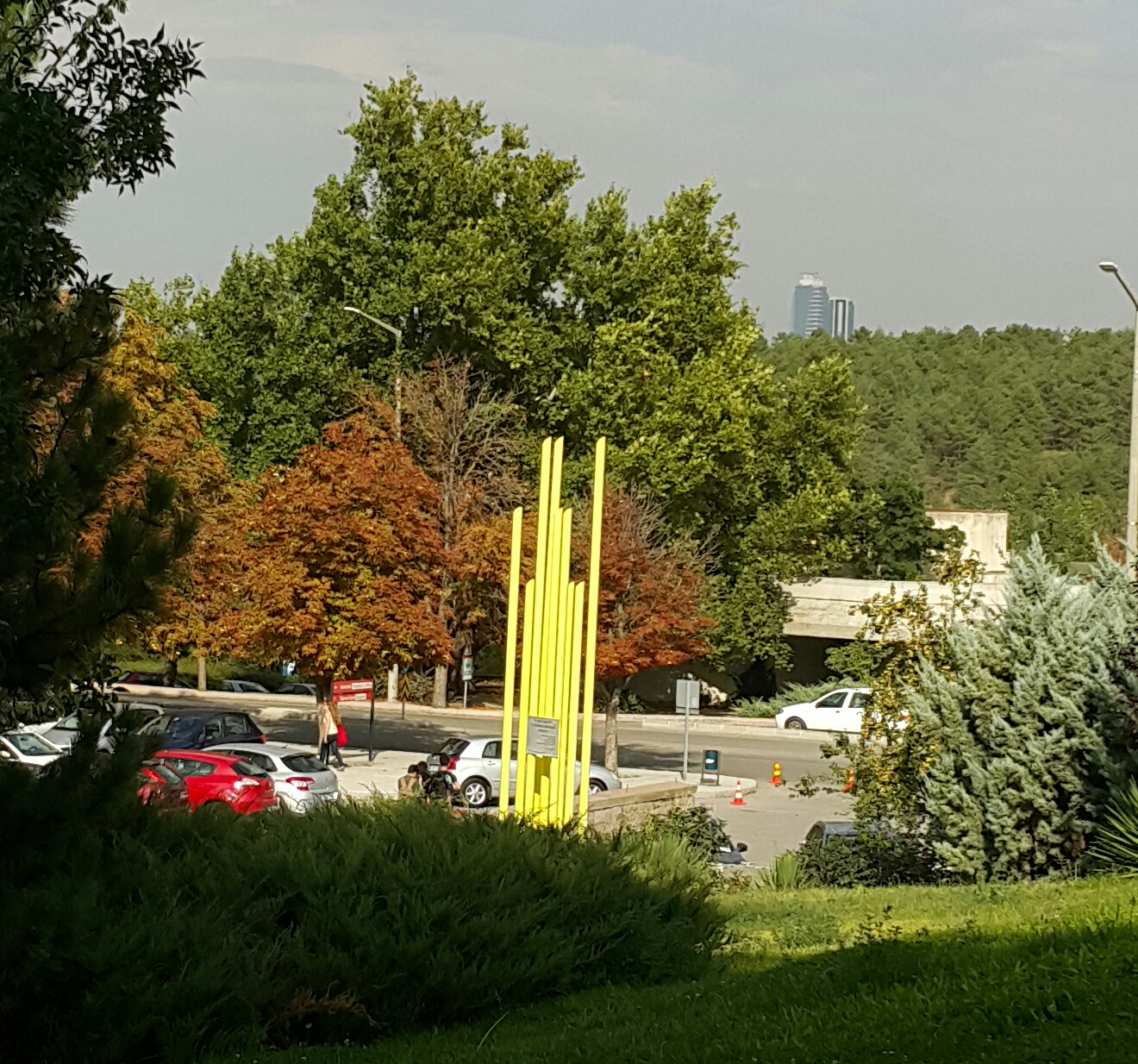 Dokuz aylık boykotun anısına dokuz direkli anıt